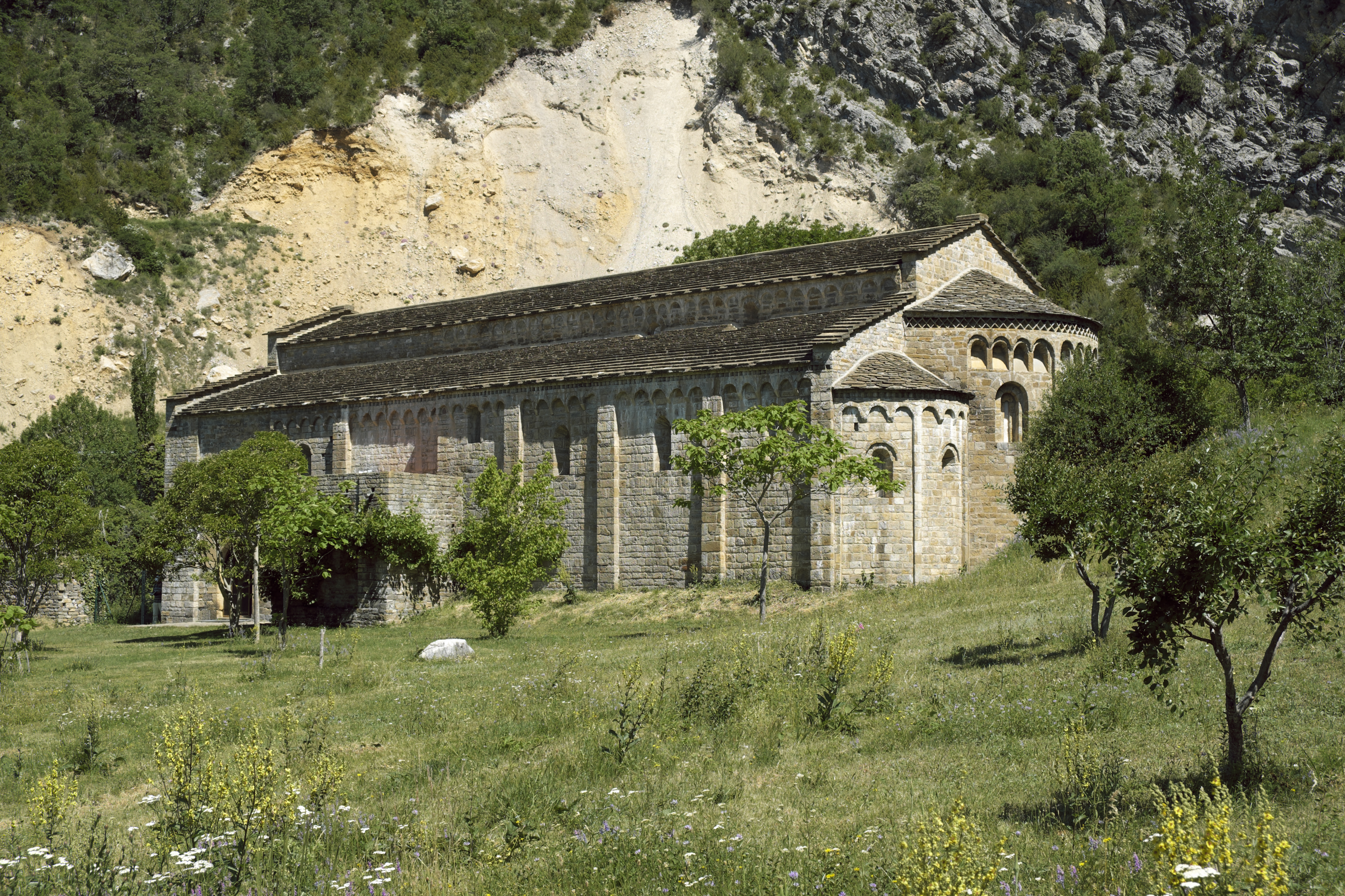 Ehemalige Benediktinerklosterkirche Santa María des Klosters Santa María de Obarra in Beranuy in der Provinz Huesca (Aragón/Spanien)